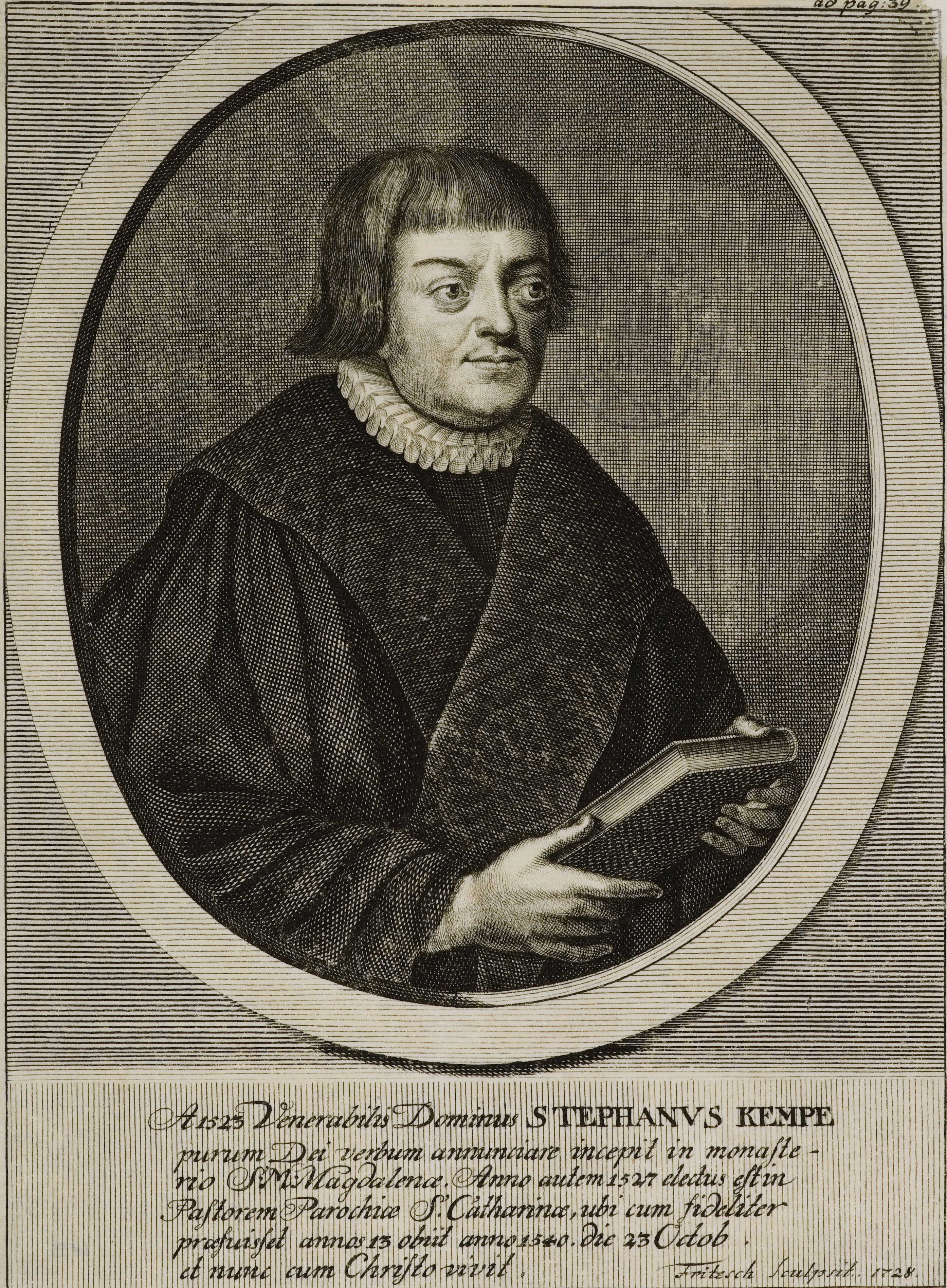 Bildnis von Stefan Kempe